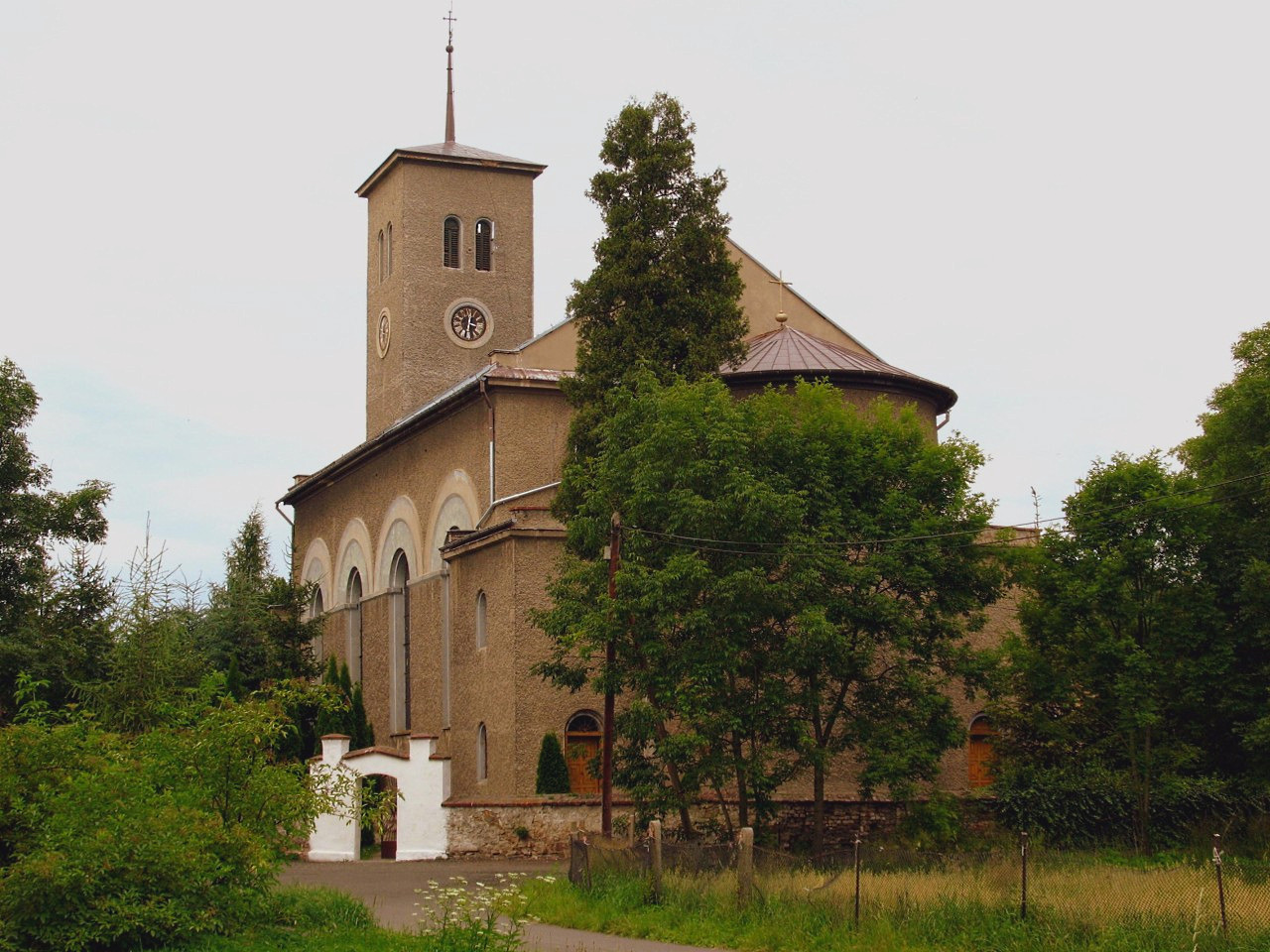 Królowe - wieś w Polsce położona w województwie opolskim, w powiecie głubczyckim, w gminie Głubczyce.